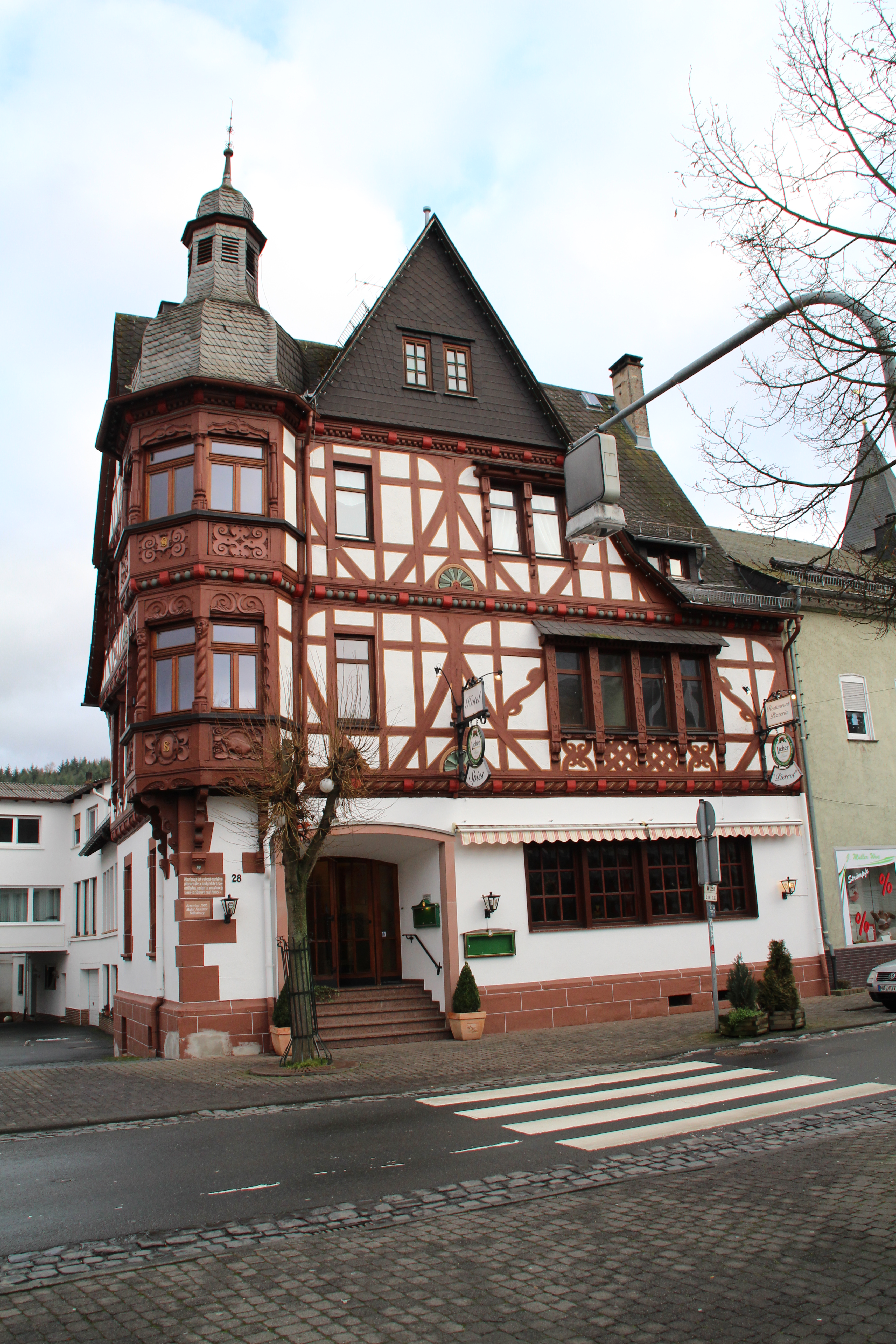 Gladenbach